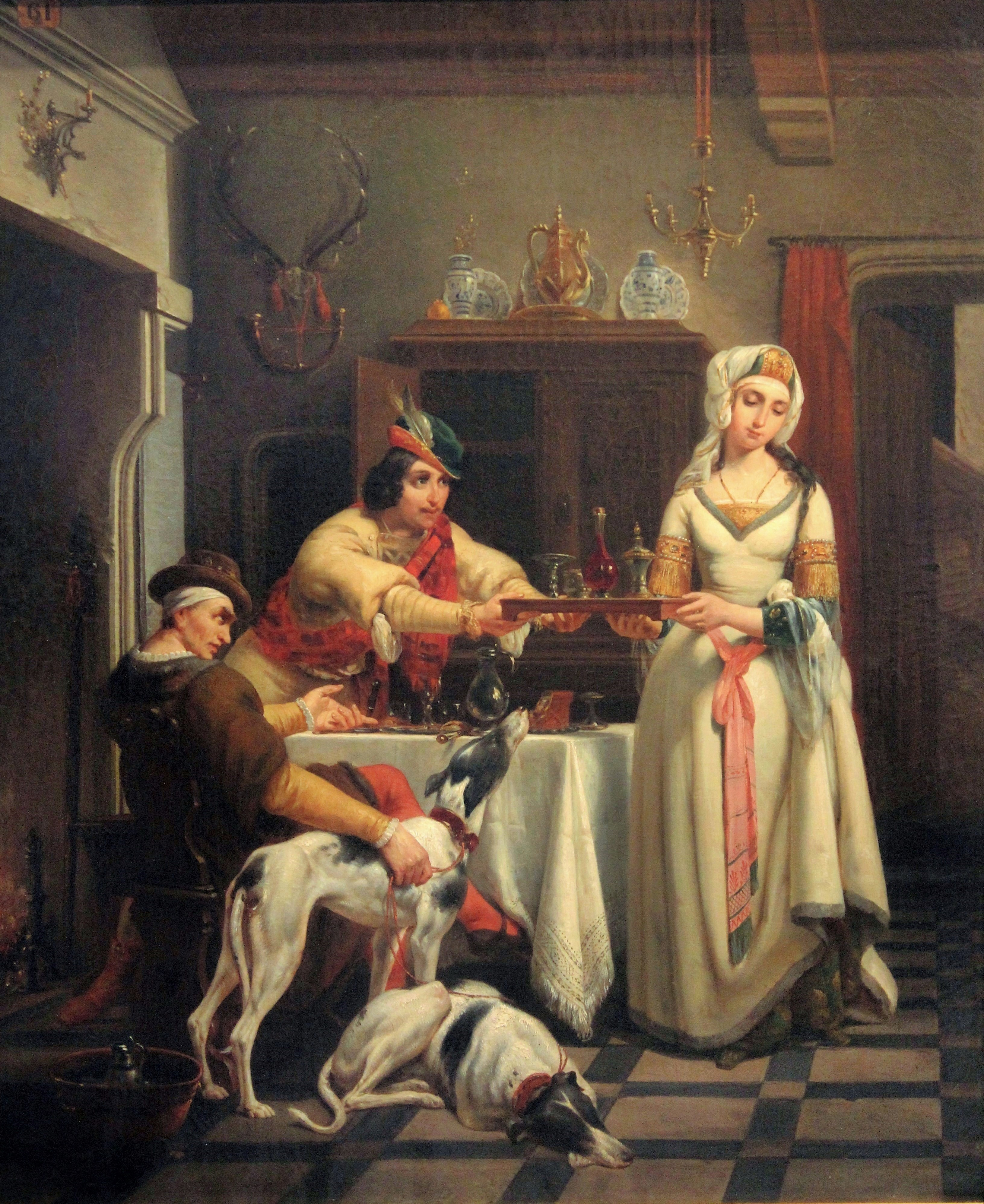 Huile sur toile - 73 x 60 cm Bourg-en-Bresse, Musée Photo : Galerie Christian Le Serbon